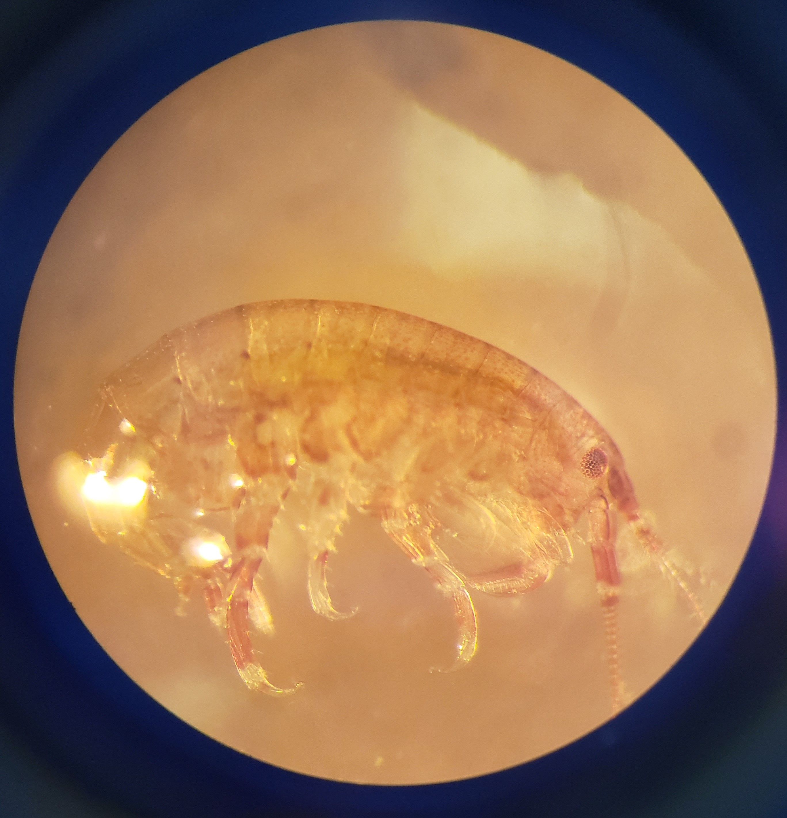 Visualização sob lupa focado na carapaça do tórax